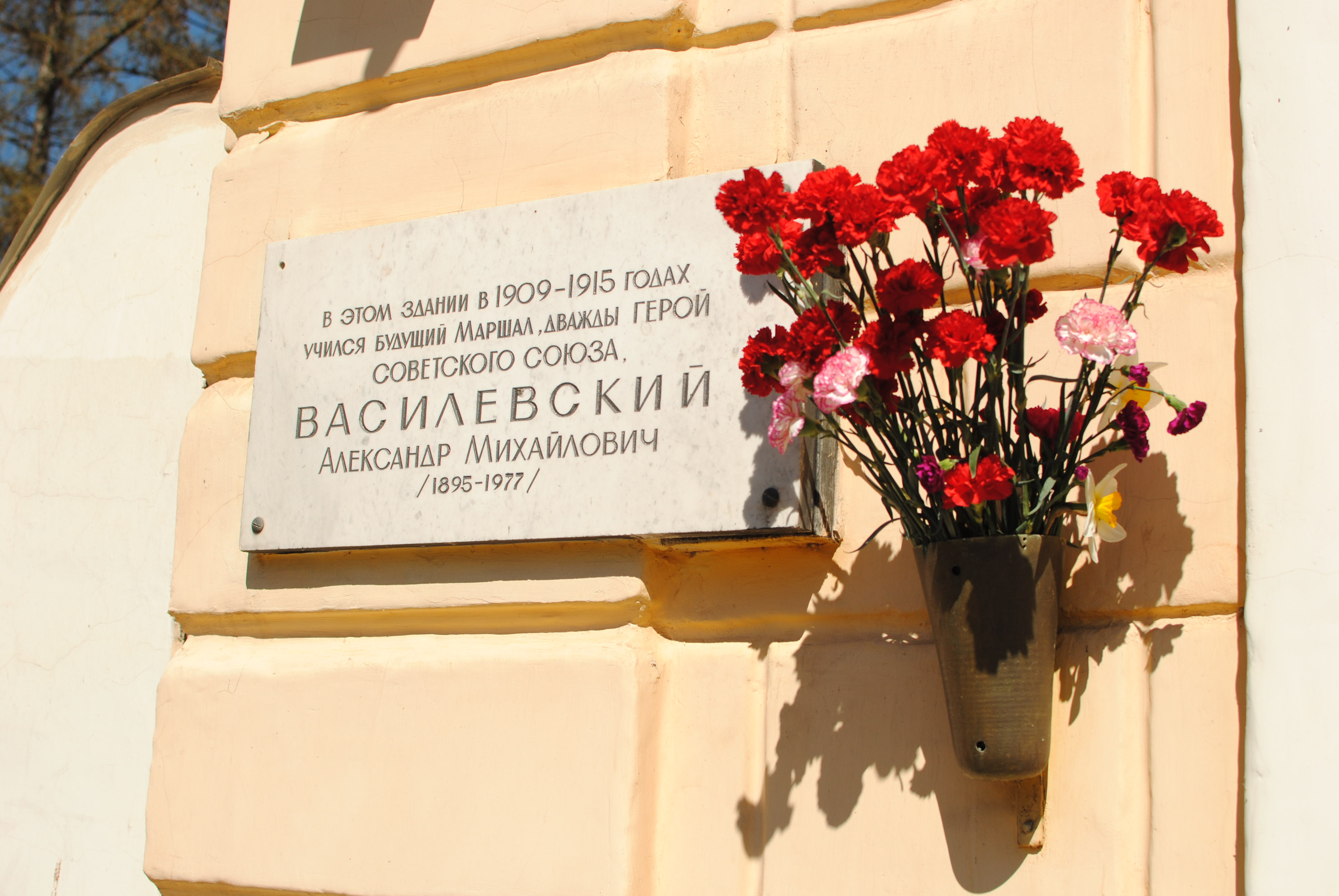 Мемориальная доска в память Маршала Советского Союза А. М. Василевского на здании Костромского государственного университета имени Н. А. Некрасова по адресу: г. Кострома, ул. 1 Мая, 14 (бывш. Костромская духовная семинария)